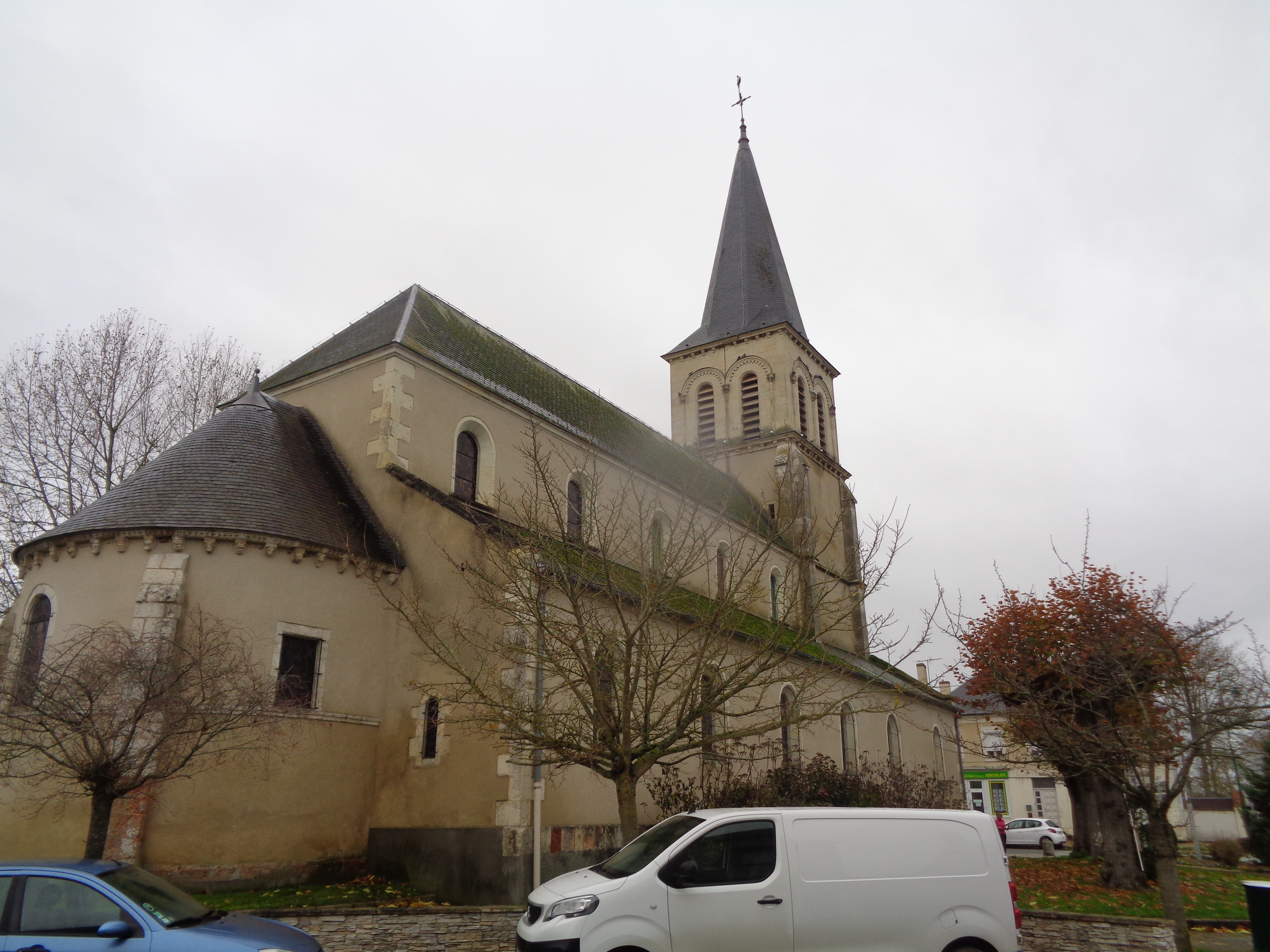 Eglise de Marmagne (Cher)